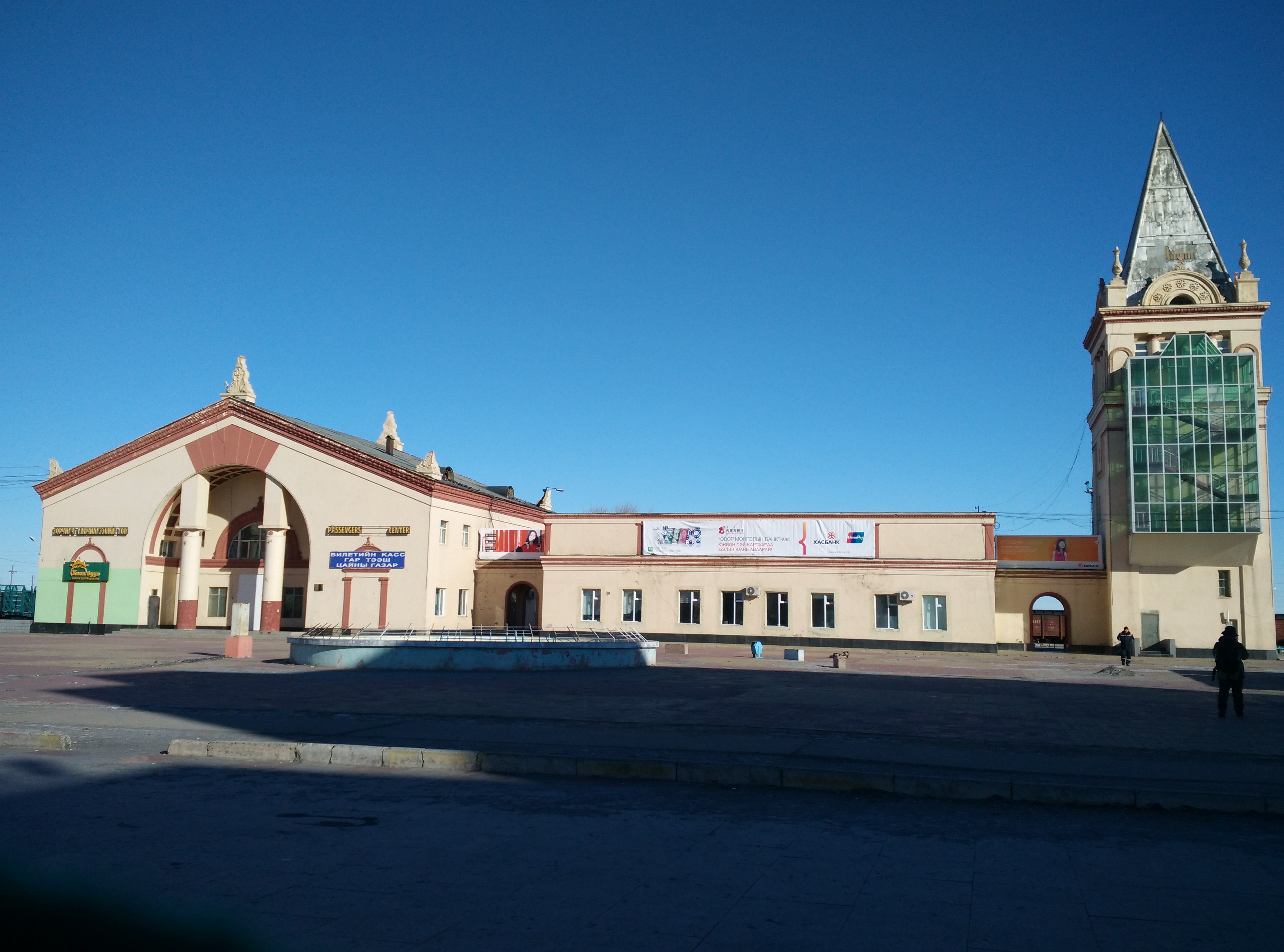 扎门乌德火车站。